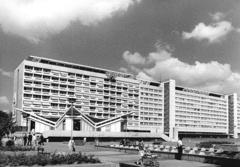 Cottbus, Stadtzentrum, Pavillion, "Kosmos-Bar" ADN-ZB Schutt-25-7-72 Cottbus: Moderne Bauten prägen das Zentrum der Bezirkshauptstadt Cottbus, die täglich von vielen Touristen aus der VR Polen besucht wird. Die attraktive Kosmos-Bar im Neubauzentrum der Stadt ist von Grünanlagen und Wasserspielen umgeben.